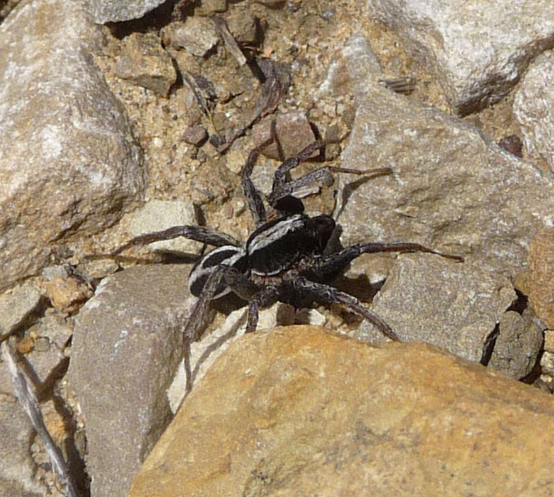 Lycosidae?. (Alopecosa cuneata?)